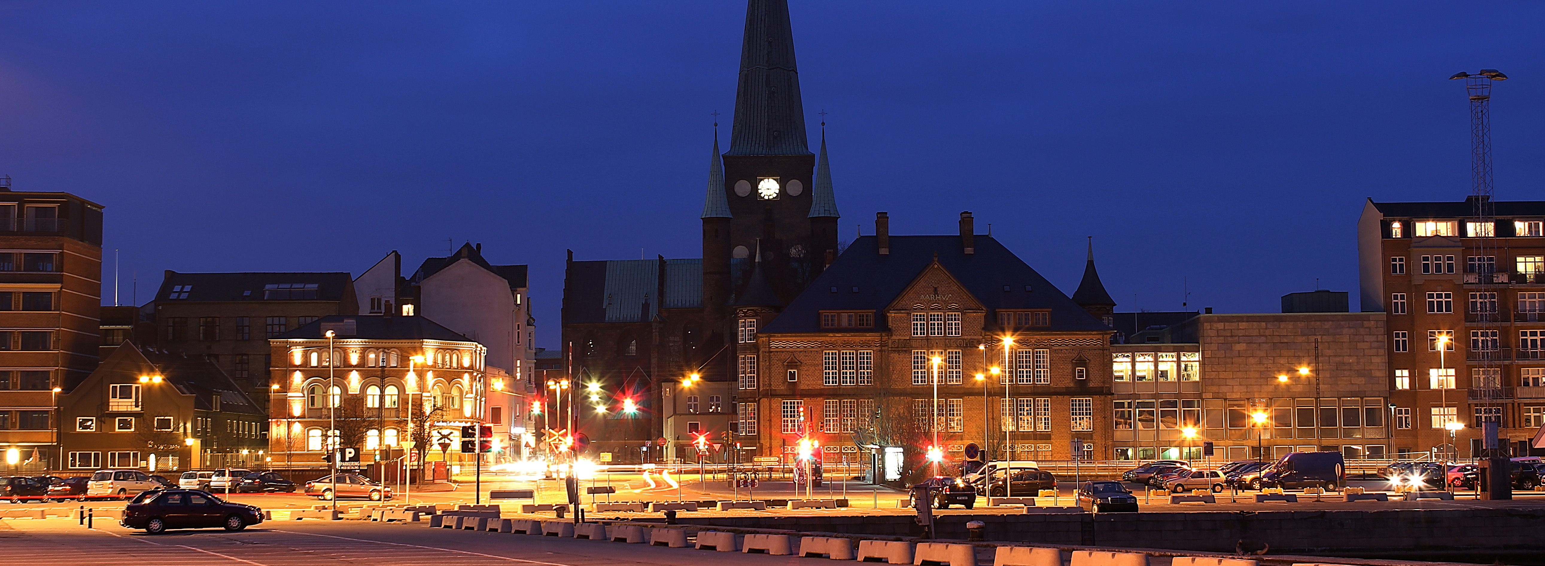 Aarhus Domkirke set fra havnen.